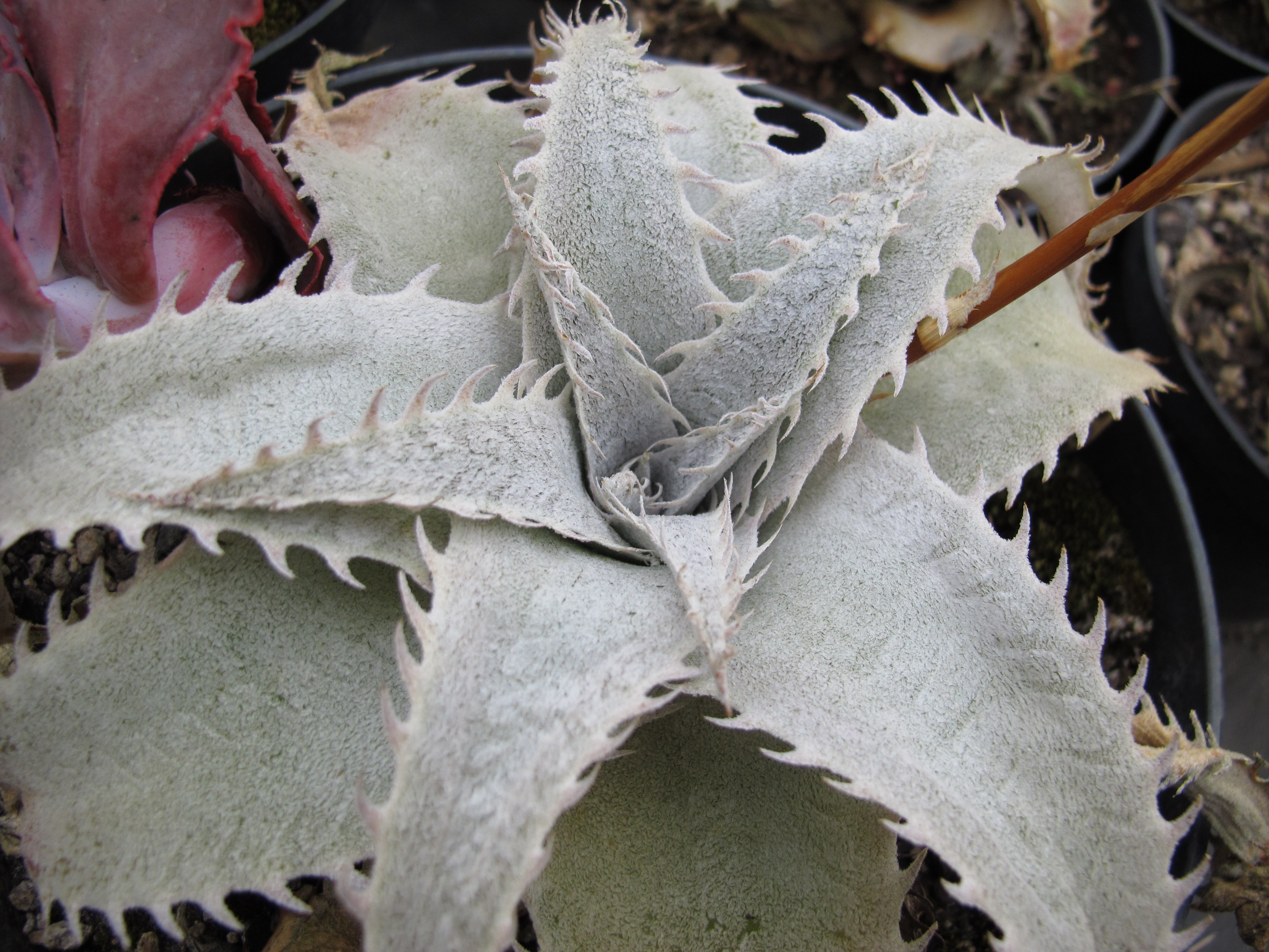 Dyckia marnier-lapostollei